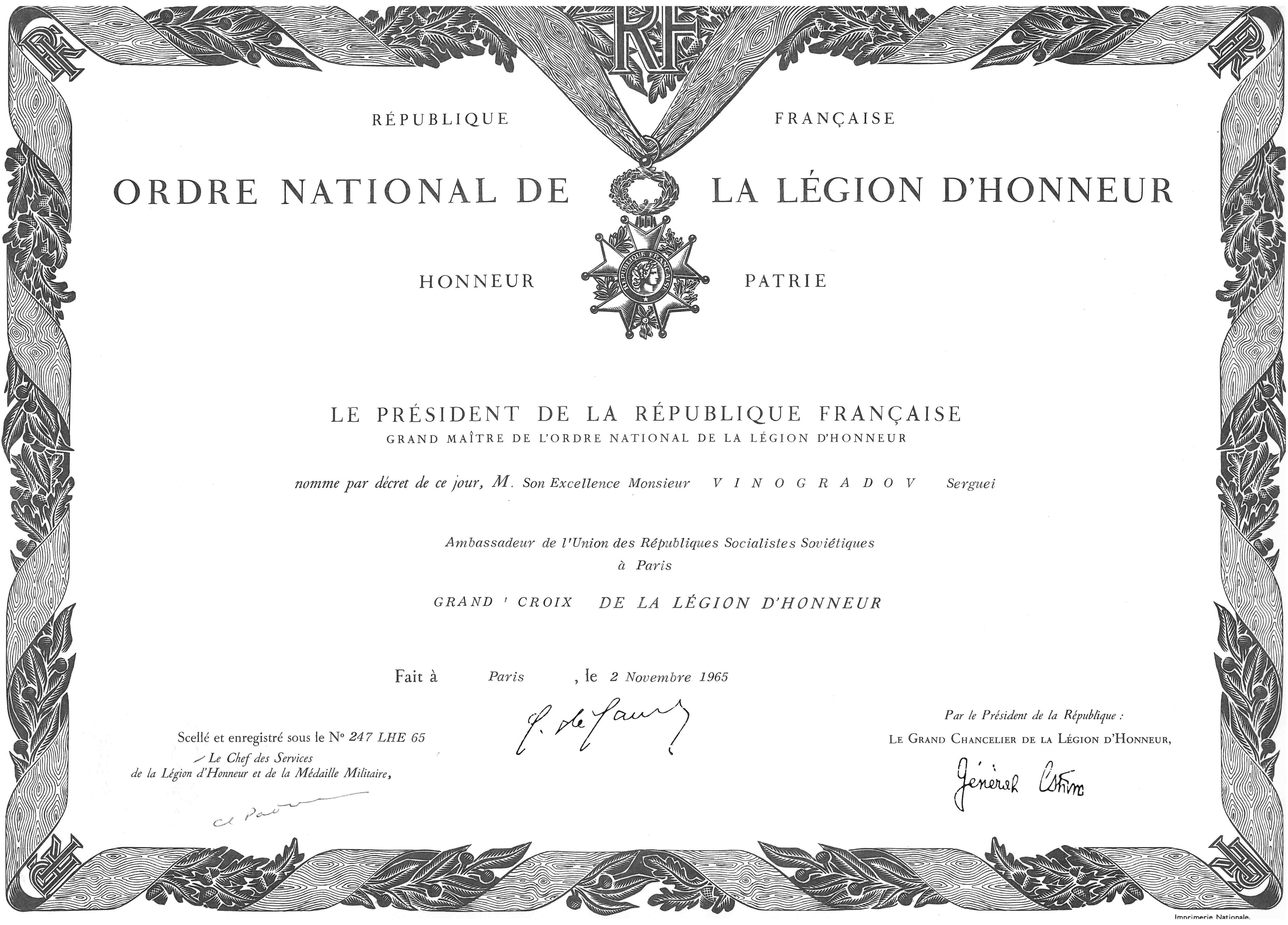 Грамота кавалера Большого Креста ордена Почётного легиона принадлежавшая Послу СССР во Франции С. А. Виноградову